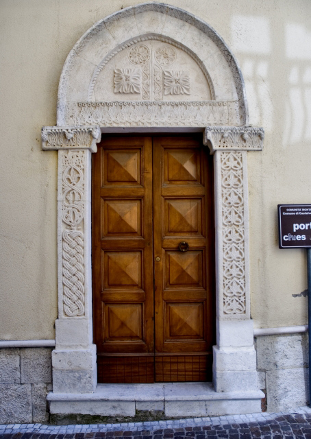 Portale della Chiesa di San Nicola, Castelvetere in Val Fortore (BN)